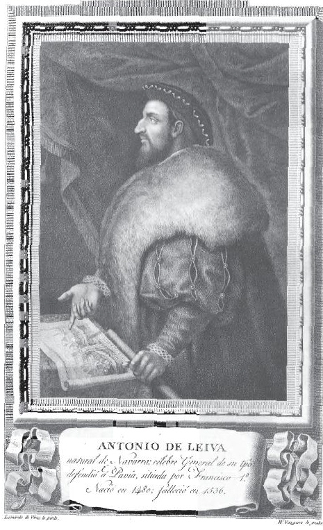 Retrato de Antonio de Leyva